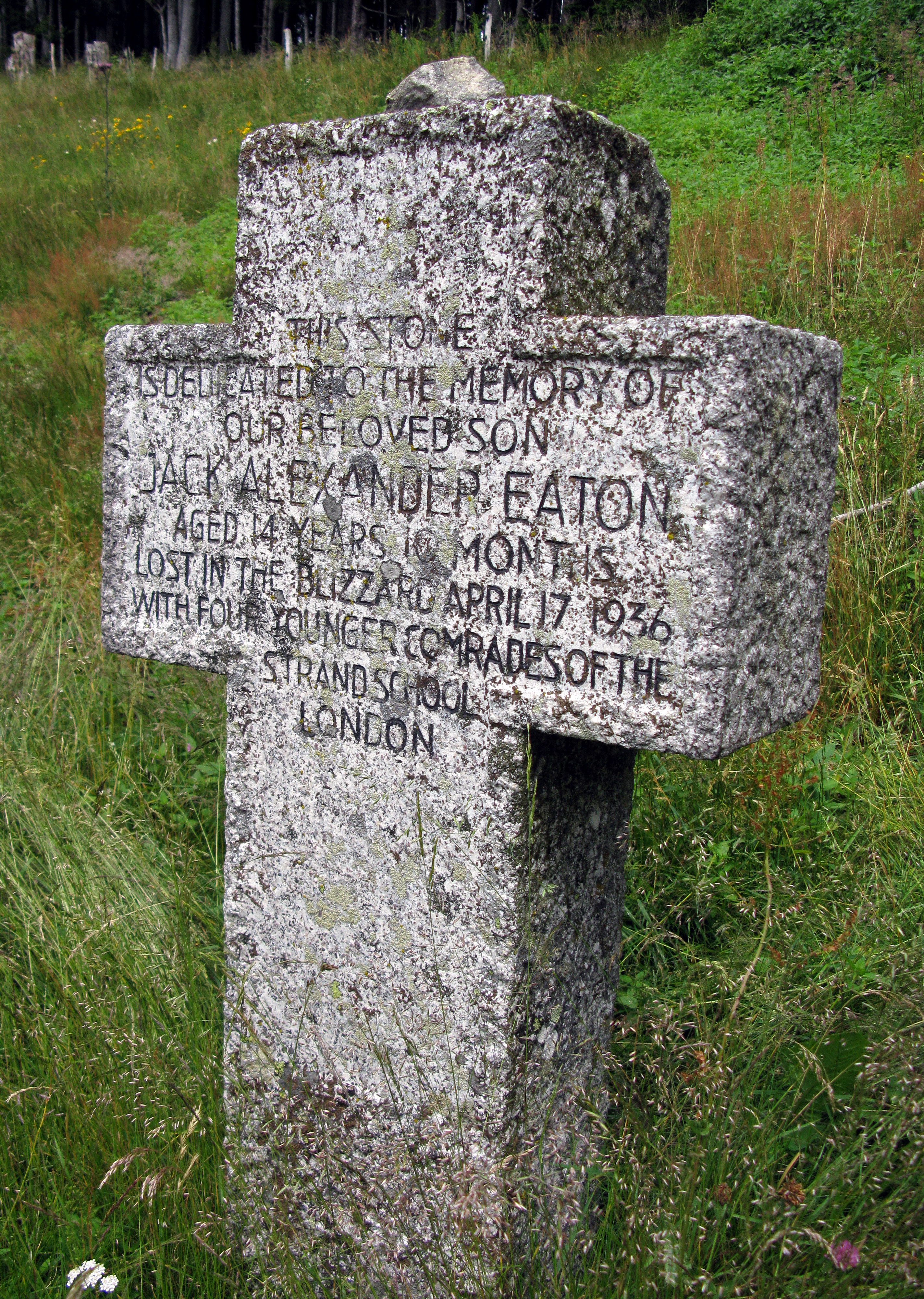 Kleines Engländerdenkmal am Schauinsland, englische Inschrift auf der Talseite